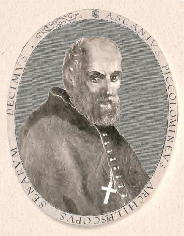 Ascanio II X Arcivescovo di Siena (Firenze 1628 - † Roma 1671)